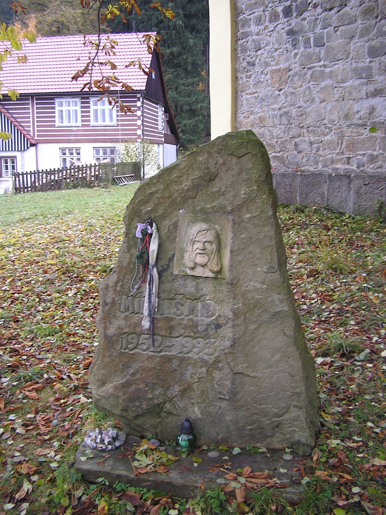 Pomník M. Šmída na Ostaši.